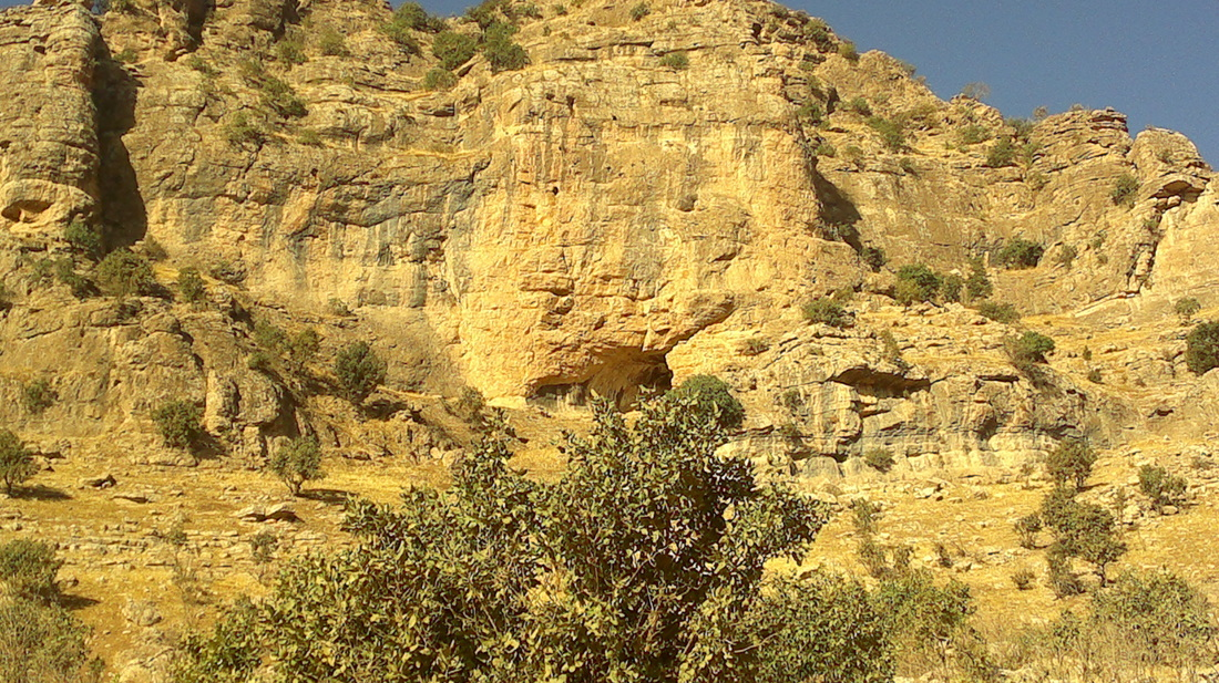 کوردی: ئەمە ئەشکەوتی گەرەکوونە کە دەکەوێتە گووندی گردەشێر